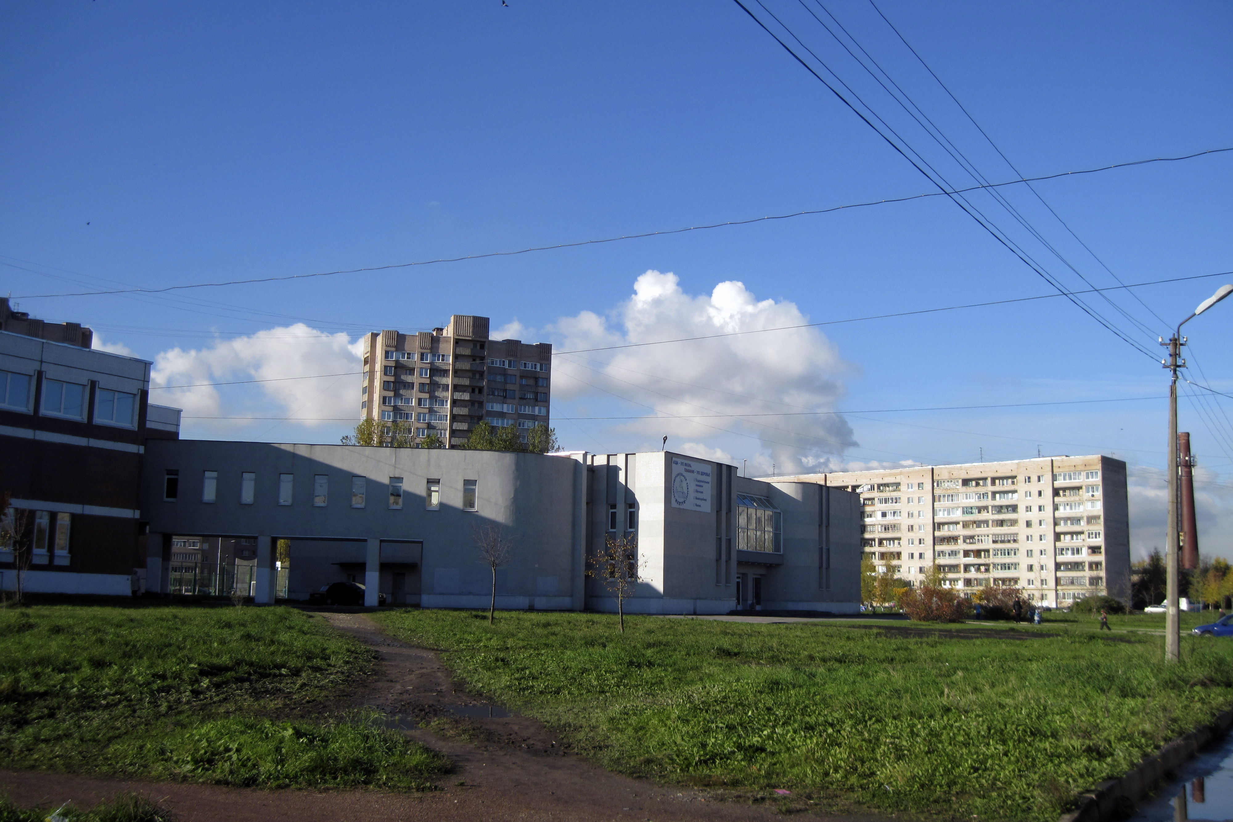 Бассейн при школе №621